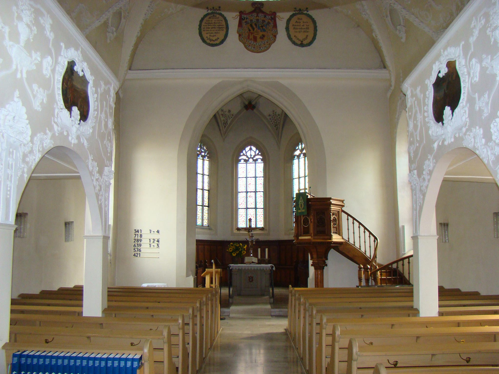 Pfarrkirche St. Hippolyt, Ottmarsheim